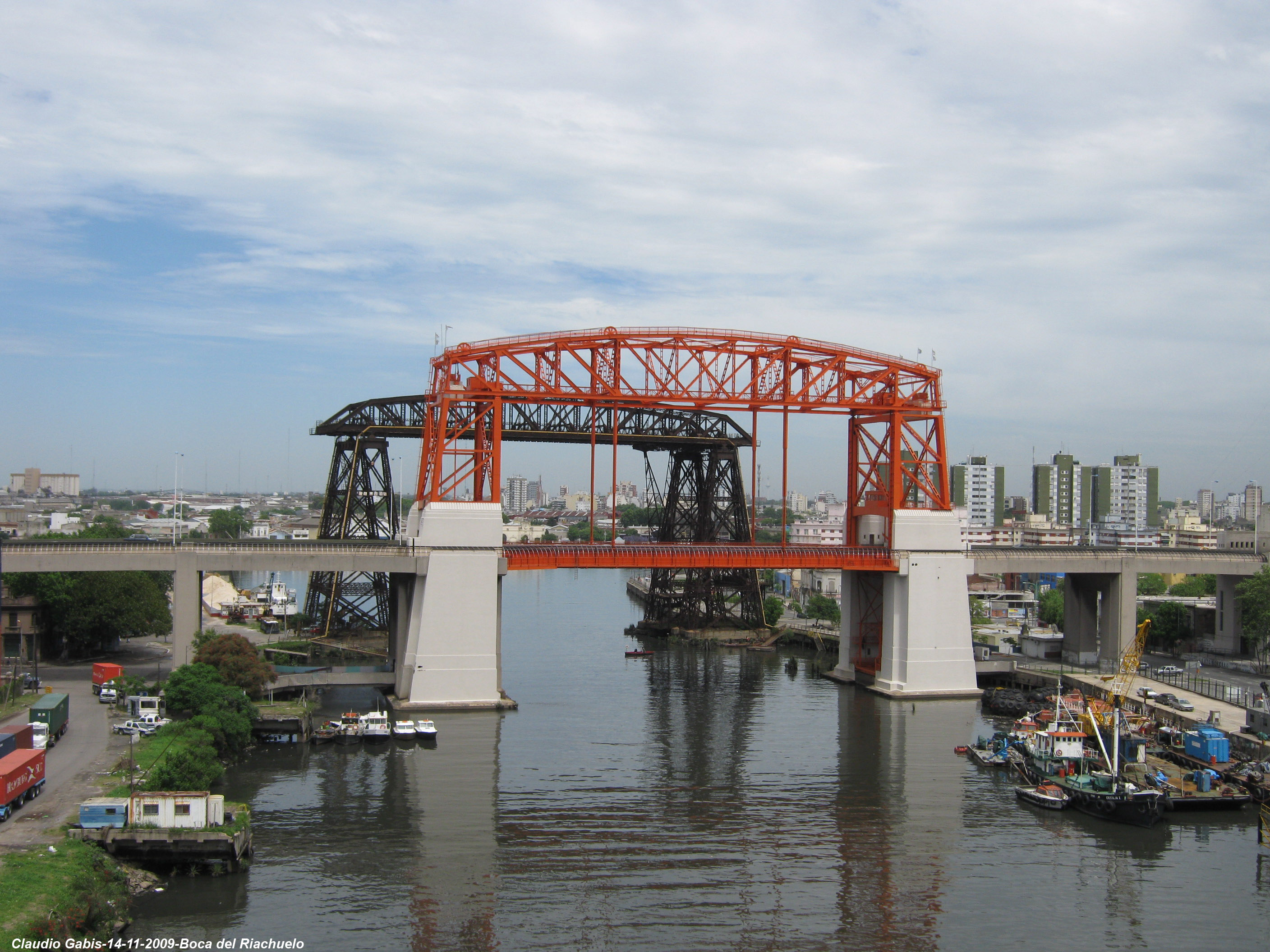 Dos puentes em Avellaneda, en primer plano el Pte. Avellaneda, atrás el viejo puente transbordador.